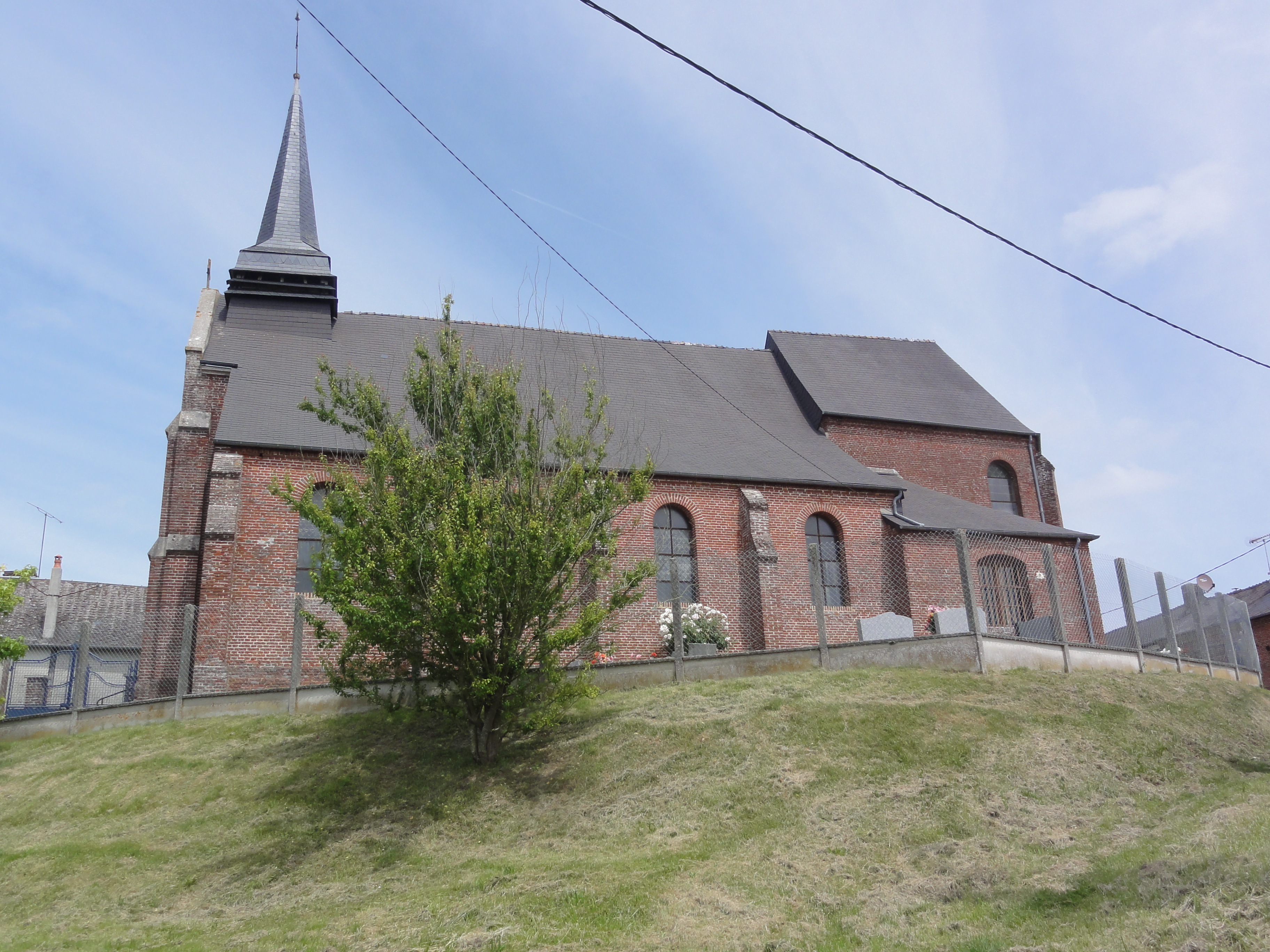 Chéry-lès-Rozoy (Aisne) église